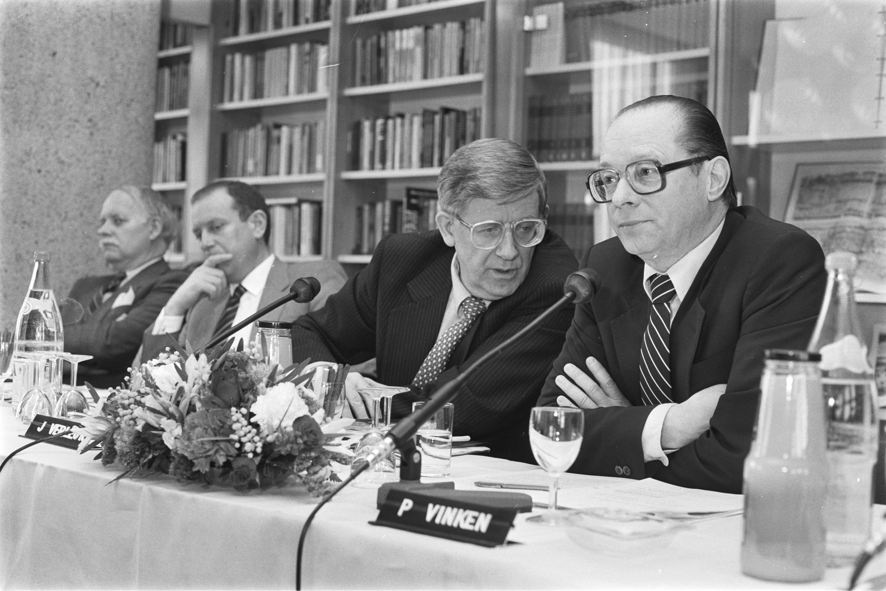 Bekendmaking jaarverslag Elsevier/NDU in Amsterdam; v.l.n leden van de Raad van Bestuur C. Alberti, J. Verbeur en P. Vinken (voorzitter). 2 april 1984